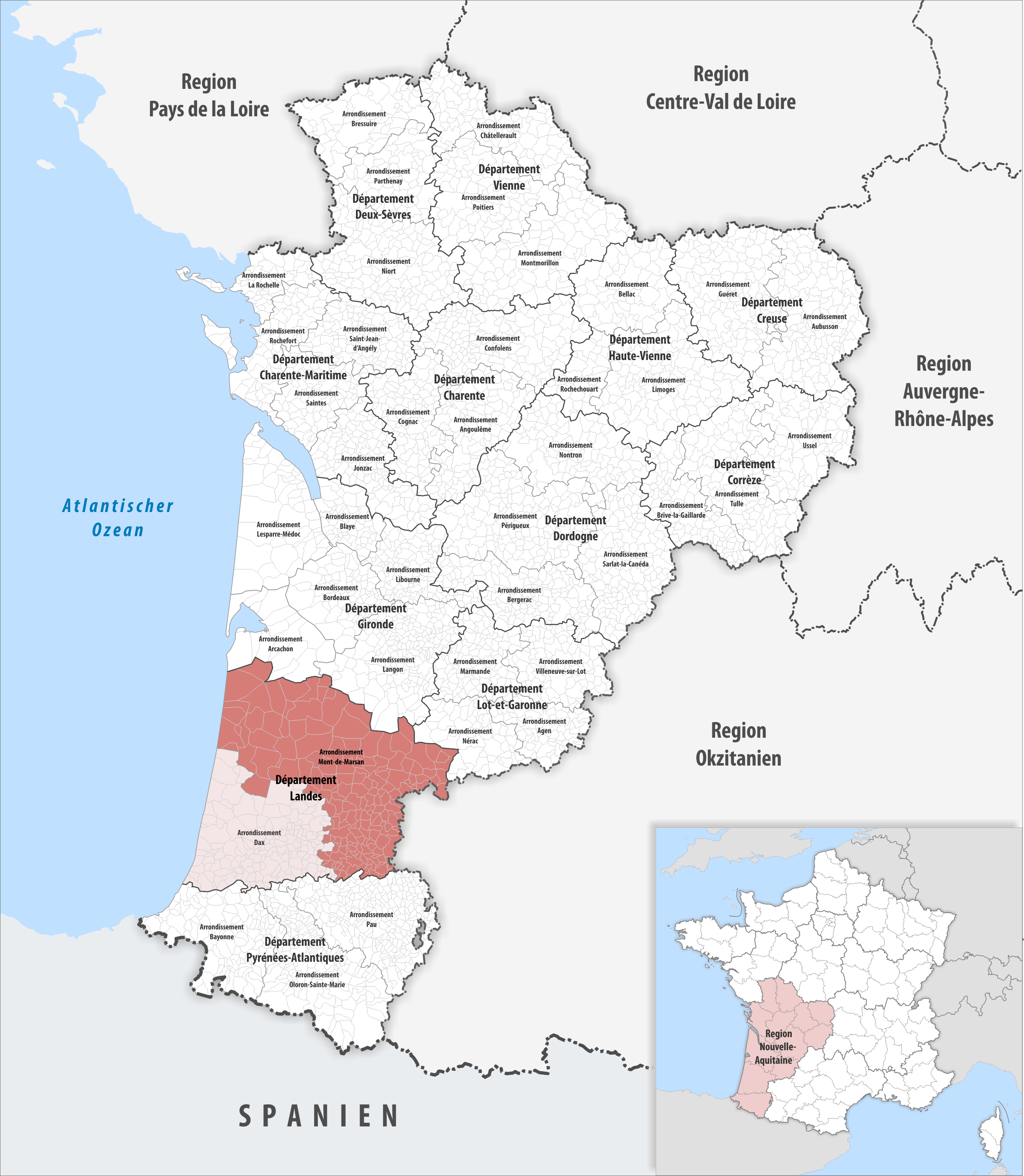 Lage des Arrondissements Mont-de-Marsan